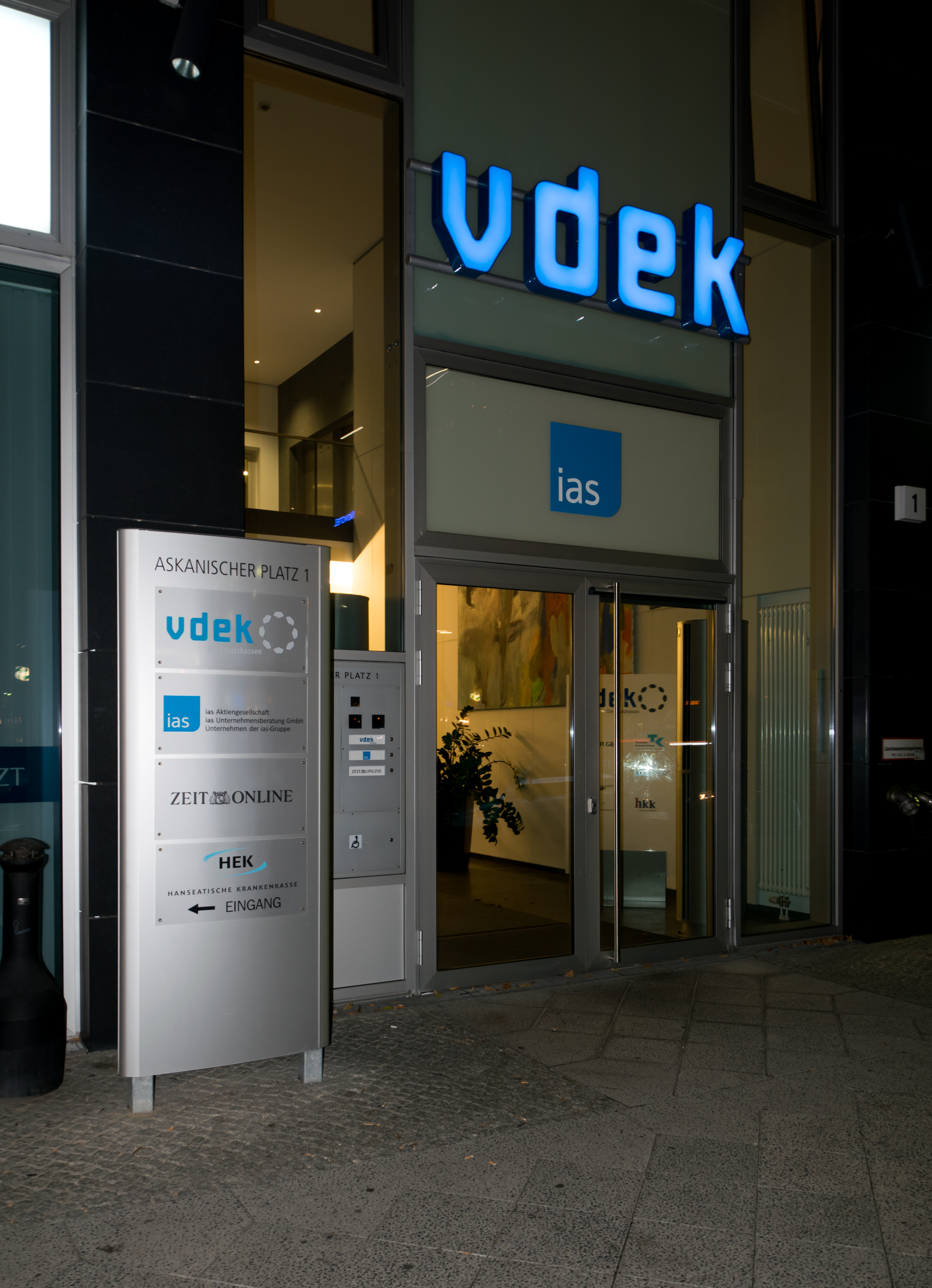 vdek Zentrale in Berlin